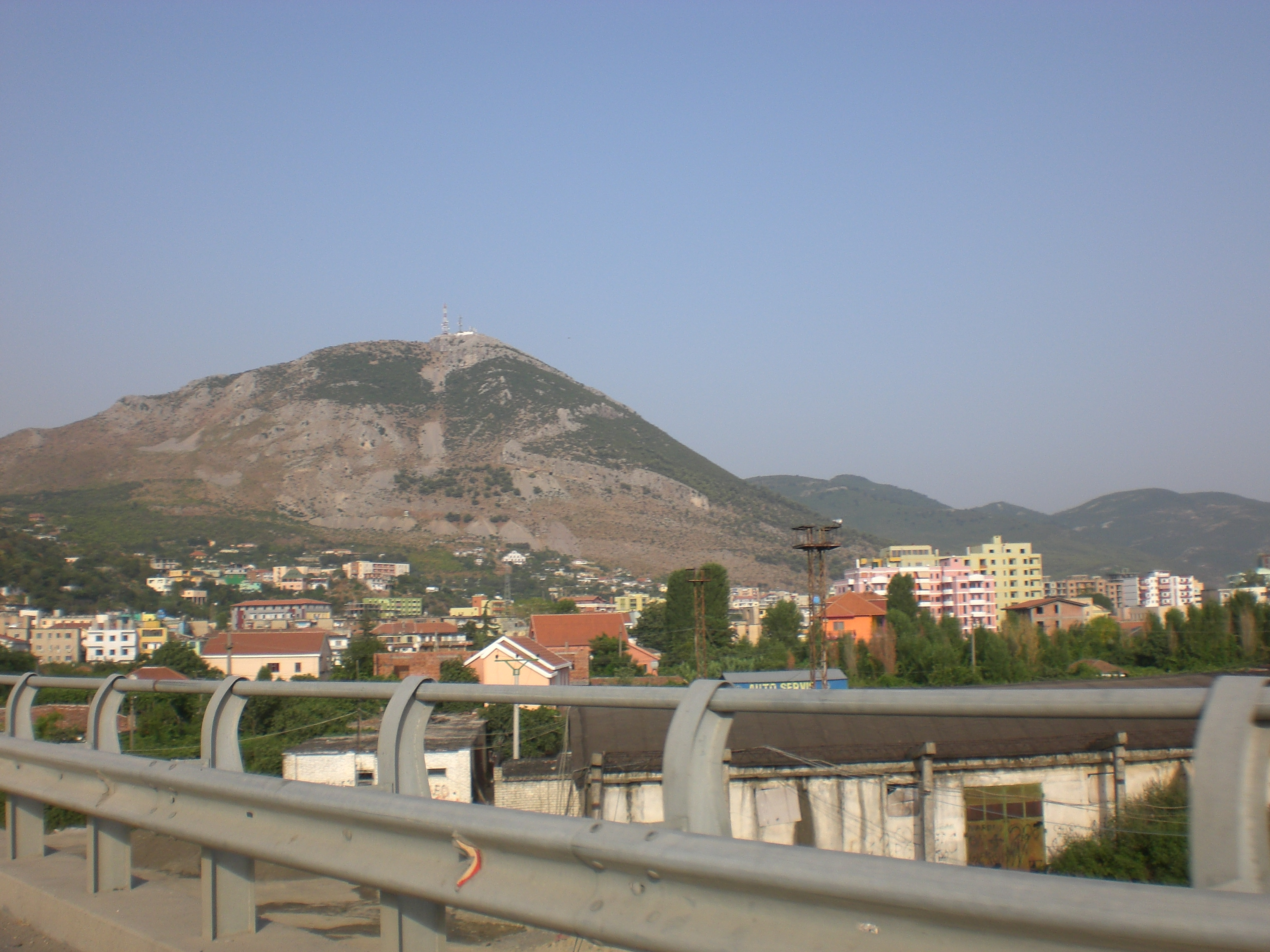 Lezha